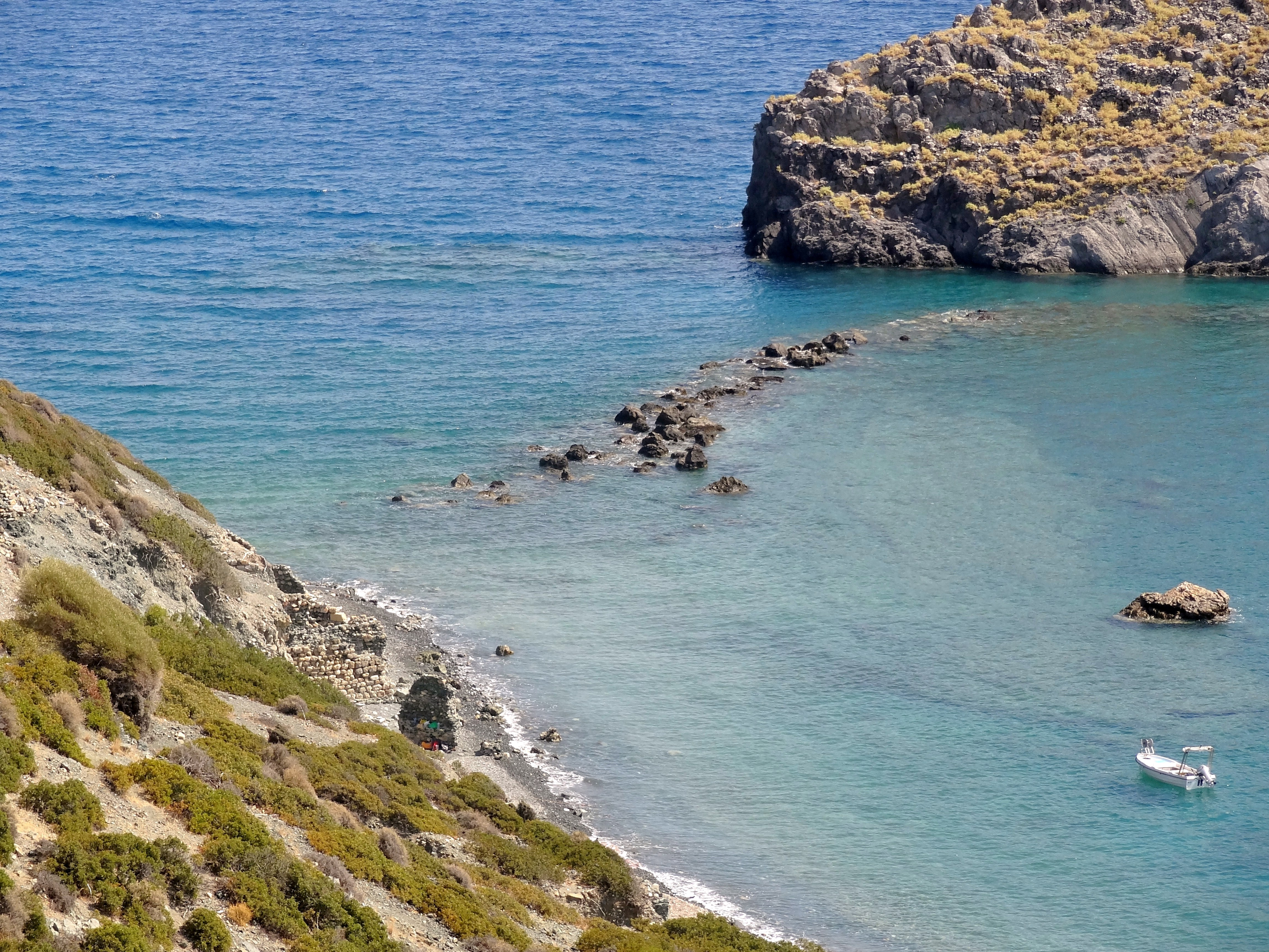 Blick auf die ehemalige Hafenmole von Lasaia (Λασαία) zur Insel Trafos (Τράφος), Gemeinde Festos, Regionalbezirk Iraklio, Kreta, Griechenland